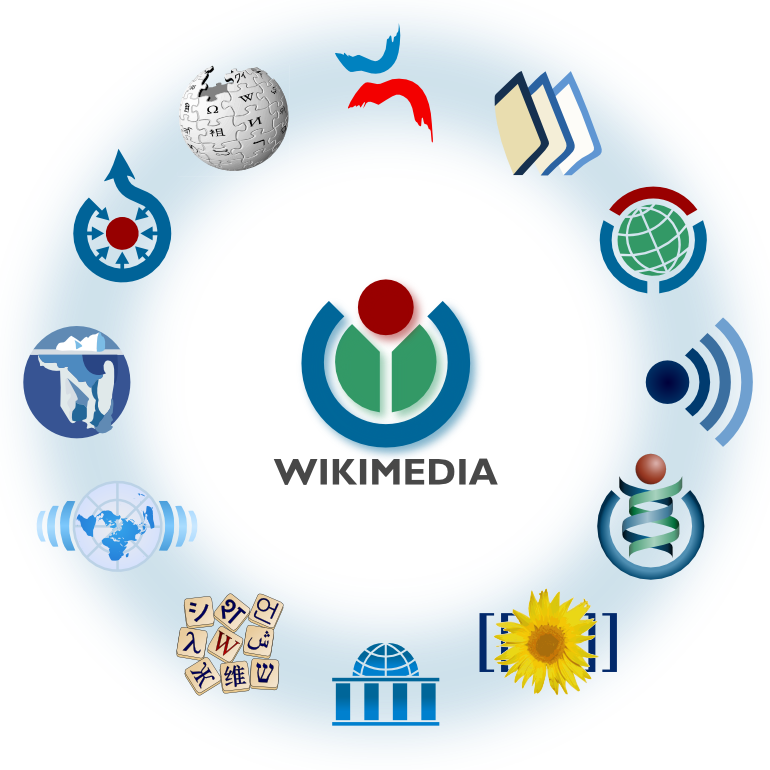 Wikimedia Logo family